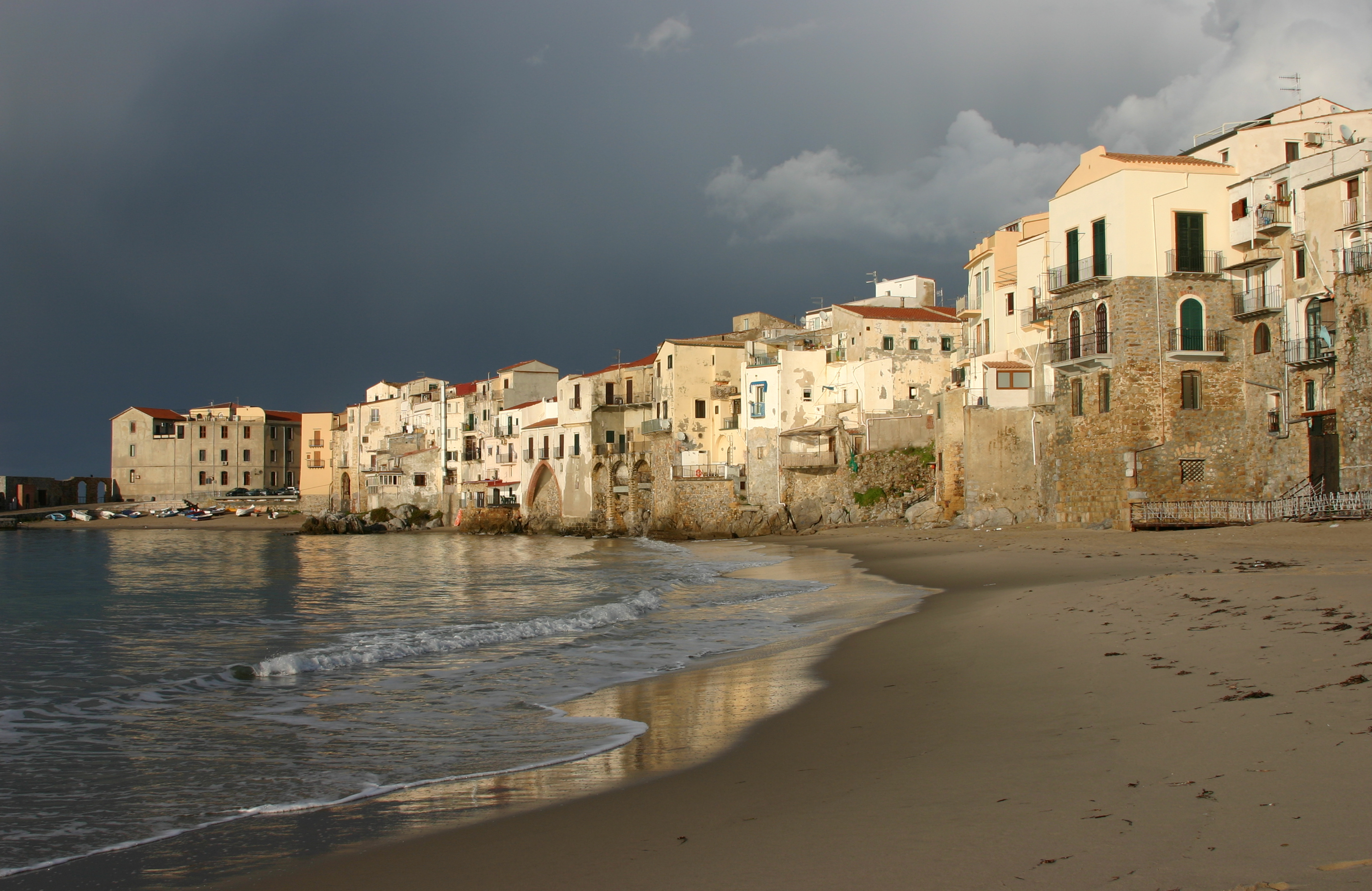 Cefalù